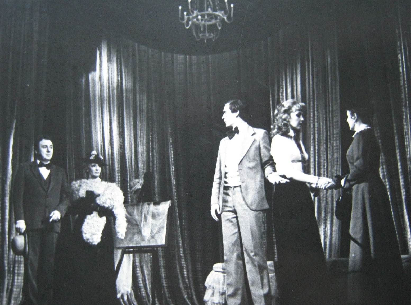 Сцена из спектакля «Ужасные родители» Р. Кульд в роли Жоржа, Е. Акуличева в роли Ивонн, Н. Буров в роли Мишеля, В. Панина в роли Мадлен, Н. Мамаева в роли Лео, режиссёр-постановщик Геннадий Егоров